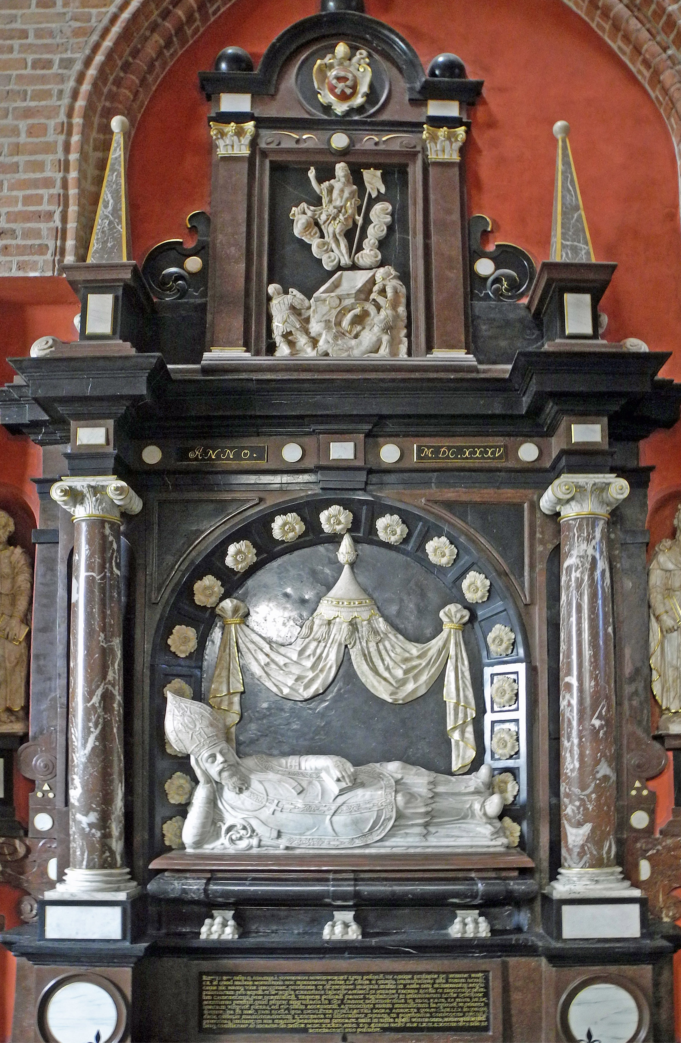 Epitaph von Adam Nowodworski (um 1572–1634), Bischof von Posen, im Chorumgang des Posener Doms – St.-Peter-und-Paul-Kathedrale auf der Dominsel in Posen (Poznań).